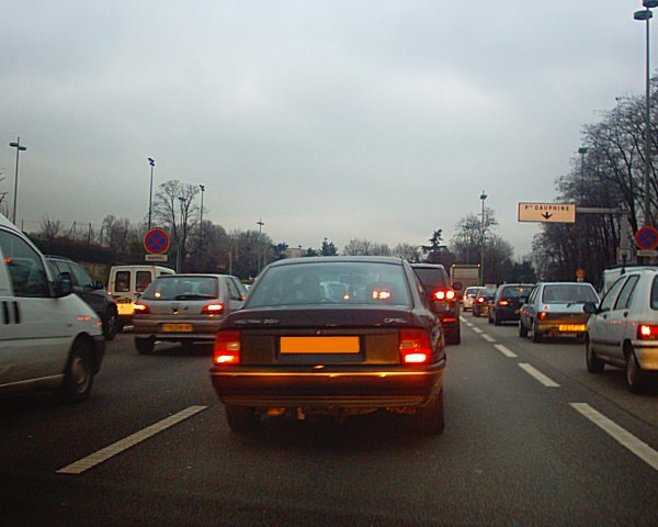 Paris (Île-de-France, France) : Le Périphérique près de la Porte Dauphine.